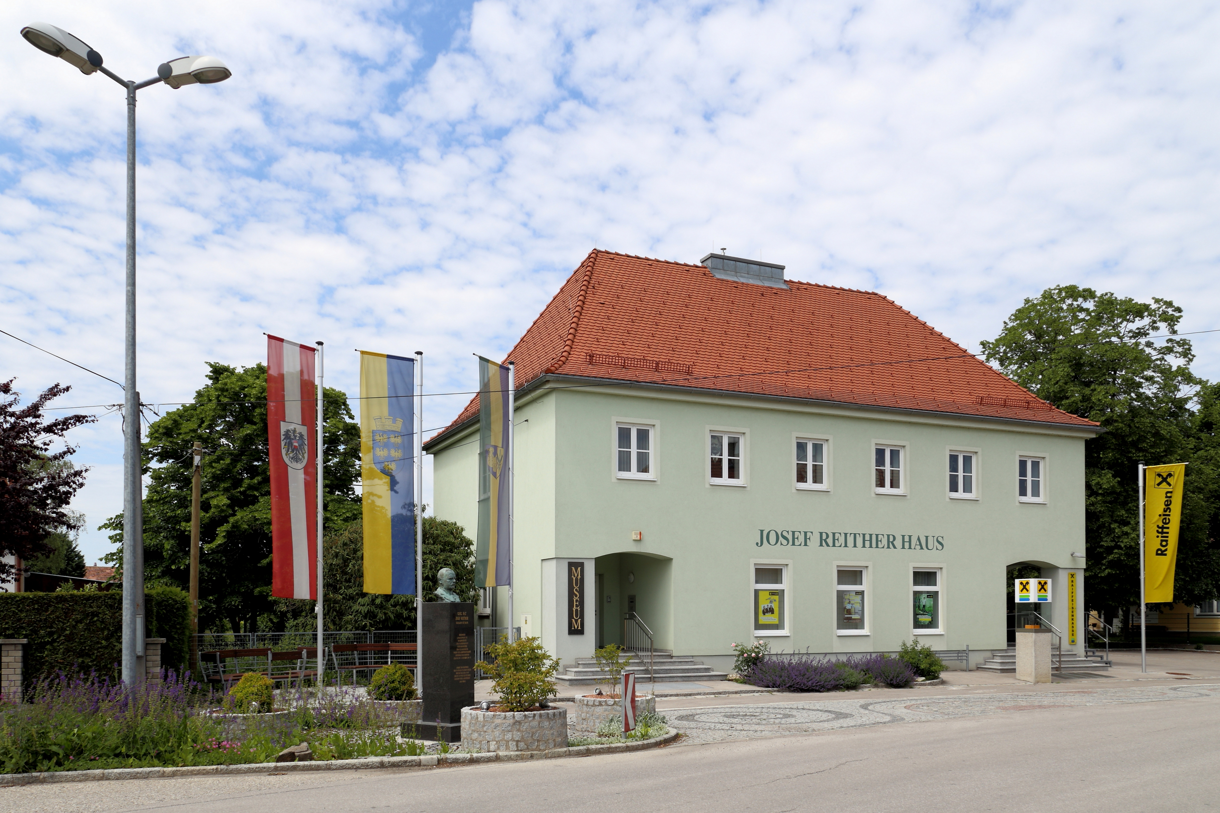 Das Josef Reither-Museum in der niederösterreichischen Marktgemeinde Langenrohr. Im ersten Stock des Gebäudes der Raiffeisenbankstelle Langenrohr wird auf einer Fläche von 120 Quadratmetern das Leben und Wirken des langjährigen Landeshauptmannes von Niederösterreich dokumentiert. Die Eröffnung des Museums fand im Oktober 2013 statt, wo gleichzeitig links vor dem Museum eine Josef Reither-Büste enthüllt wurde.